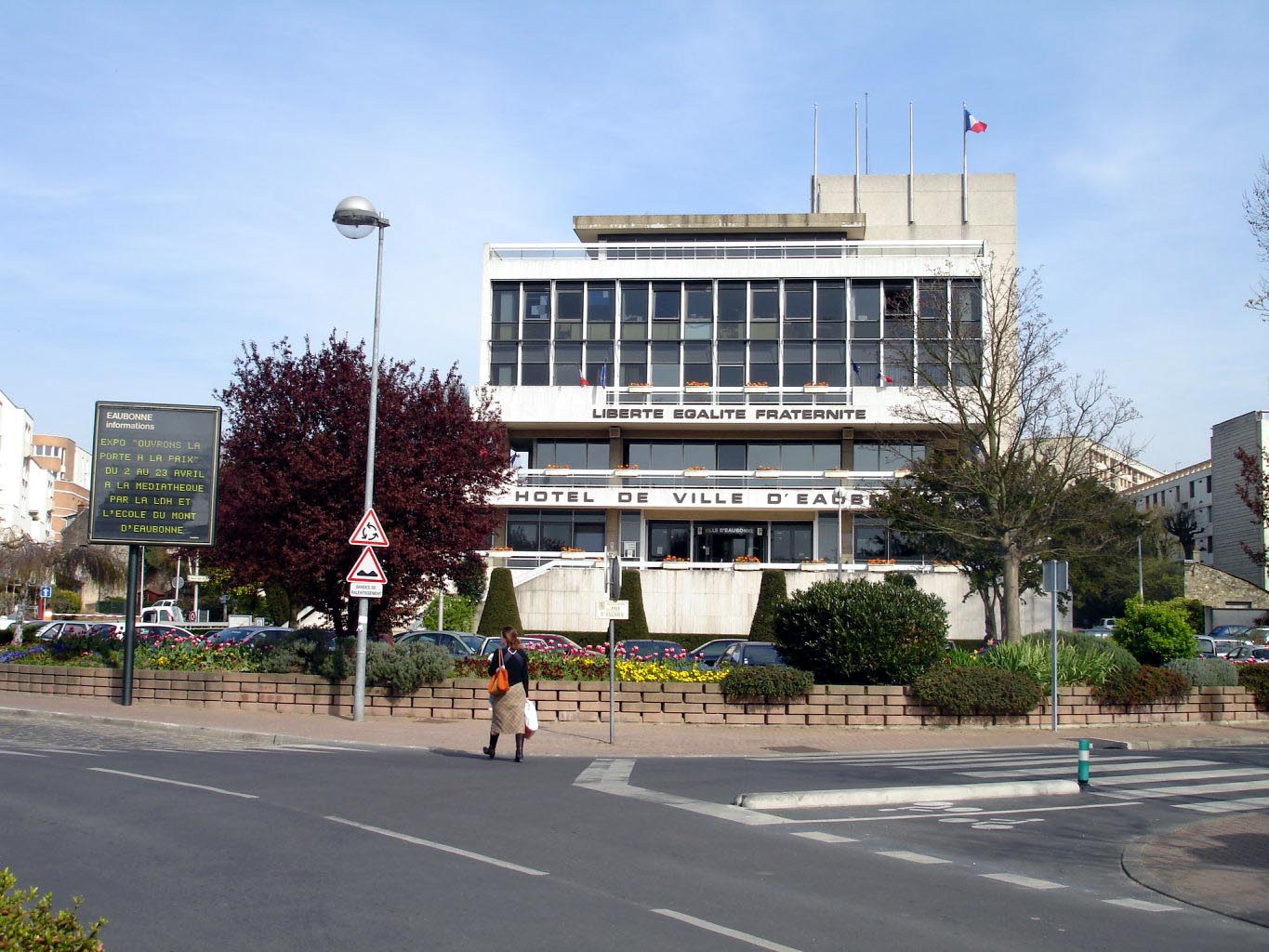 Hôtel-de-Ville d'Eaubonne (Val-d'Oise), France